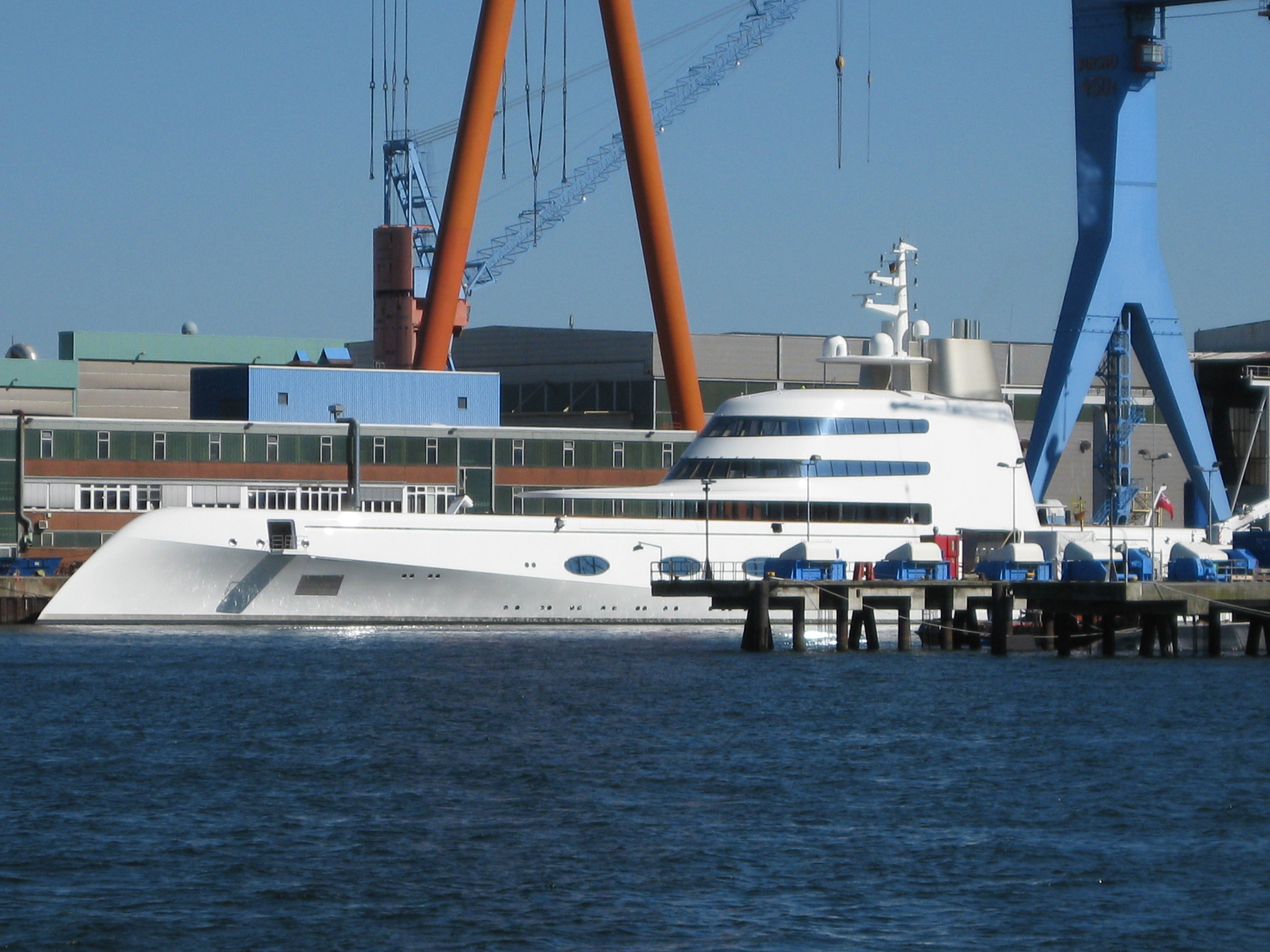 Megayacht "A" in der Kieler Werft HDW